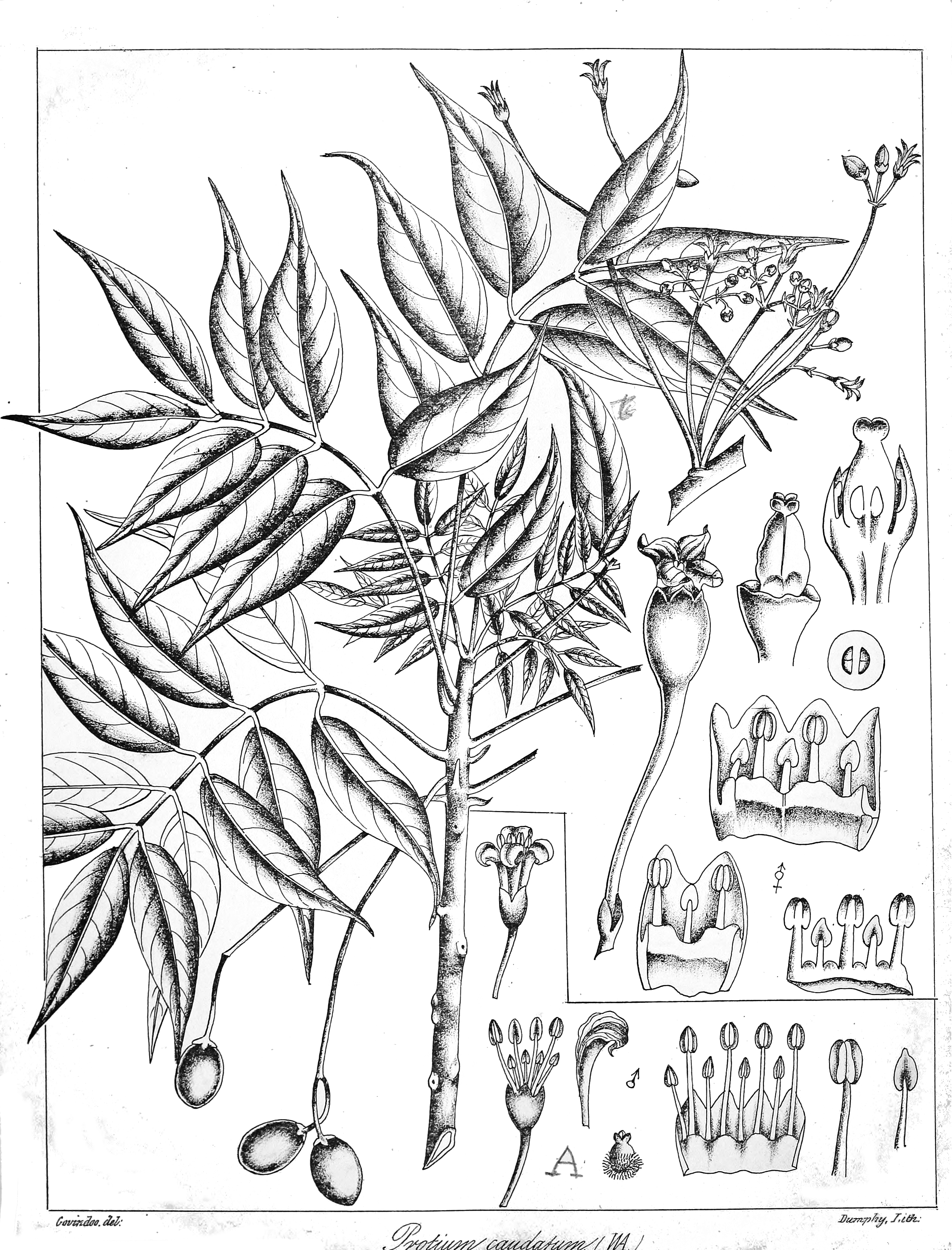 Protium caudatum